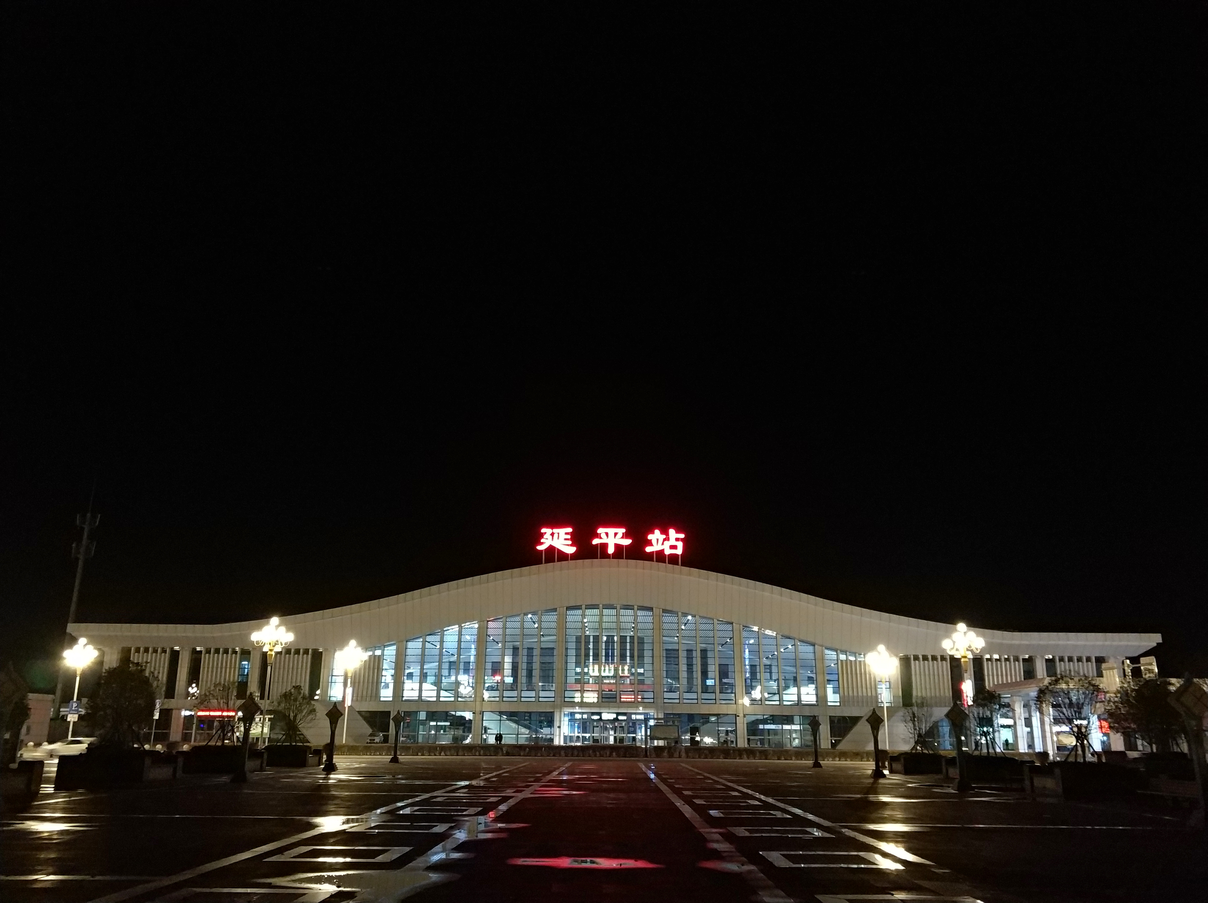 中文（中国大陆）: 延平站，原南平北站。